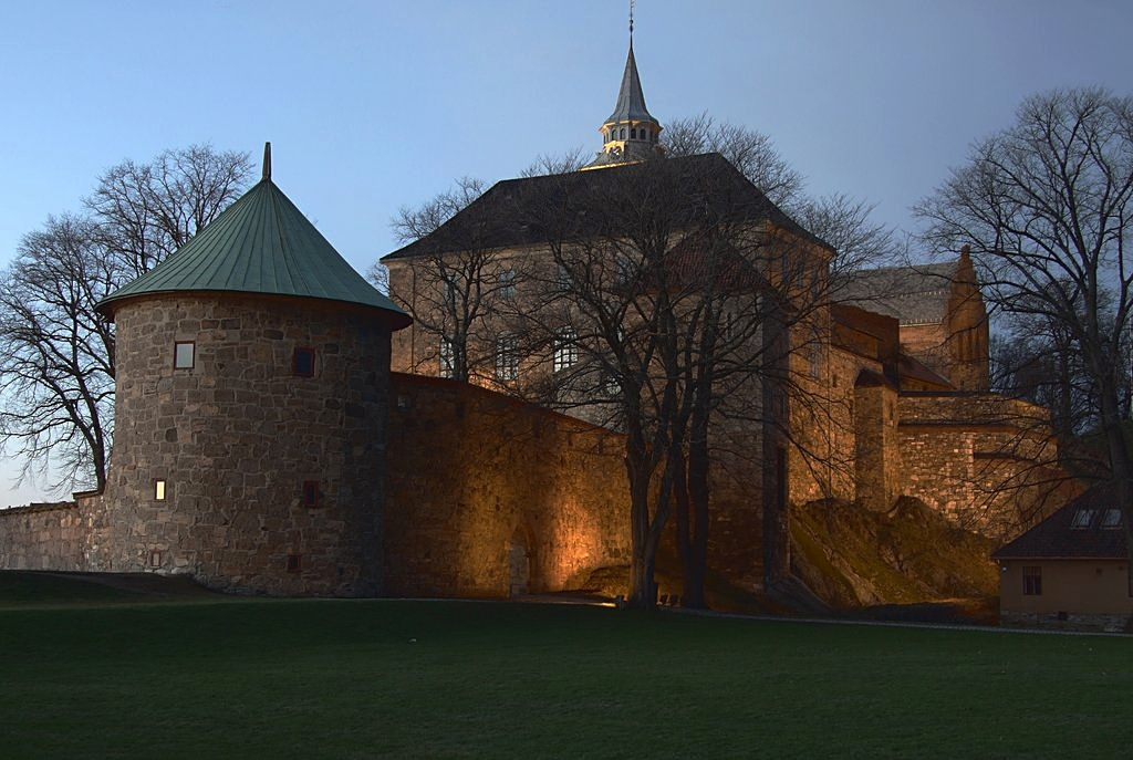 Akershus Festning HDR (2007-01)